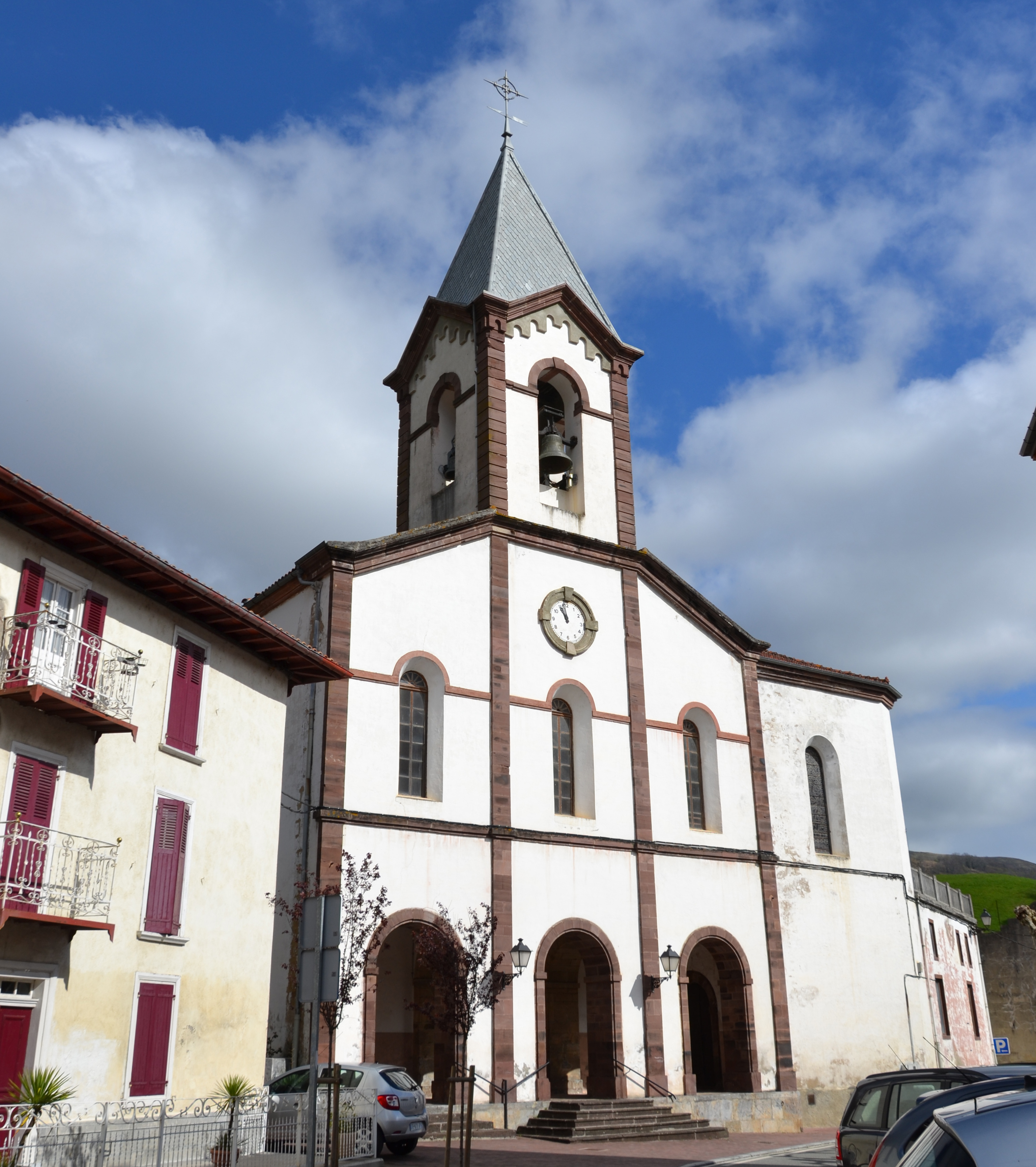 église de Valcarlos